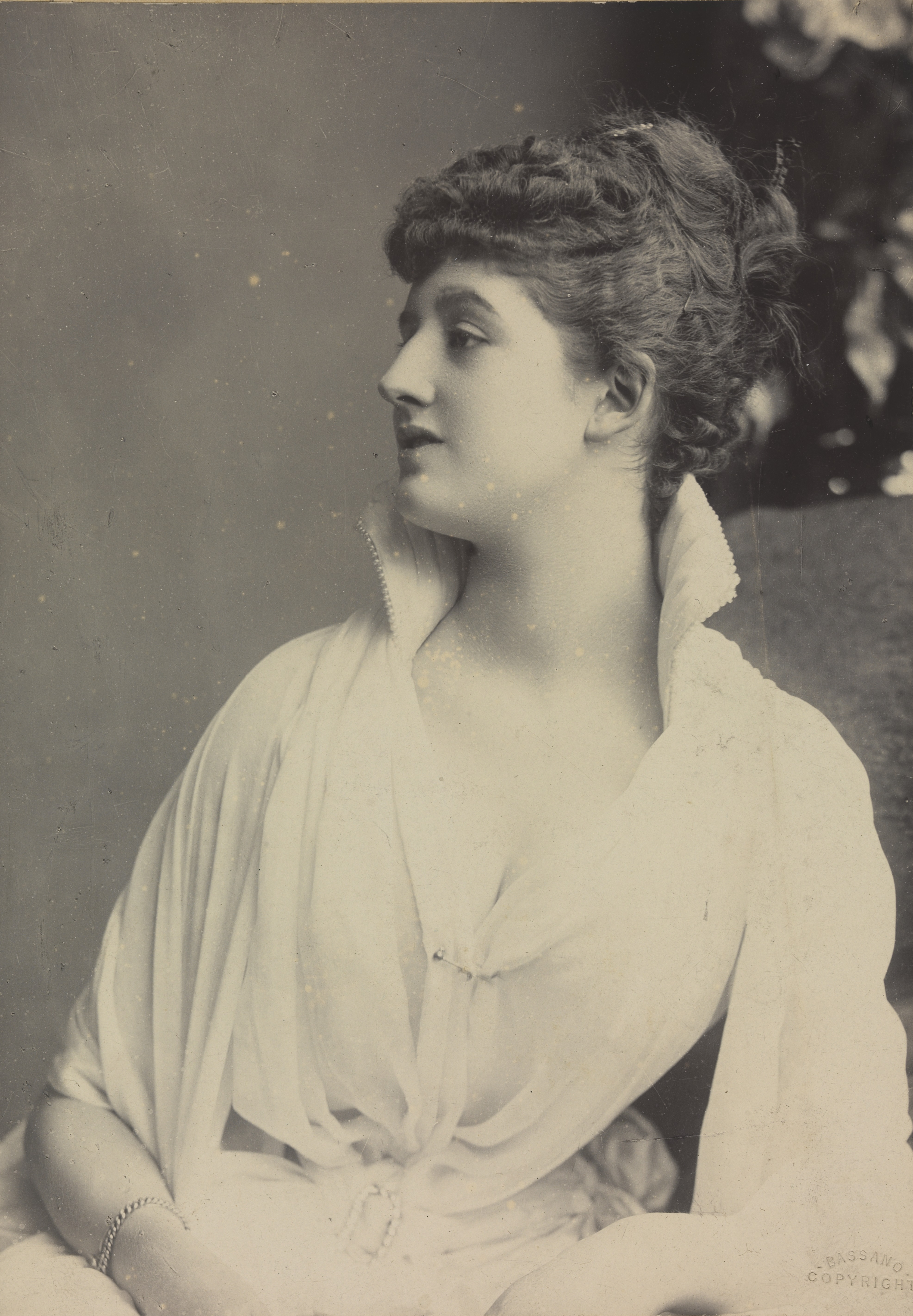 Priscilla Cecilia, Countess Annesley Depicted person: Priscilla Cecilia, Countess Annesley Depicted place: London